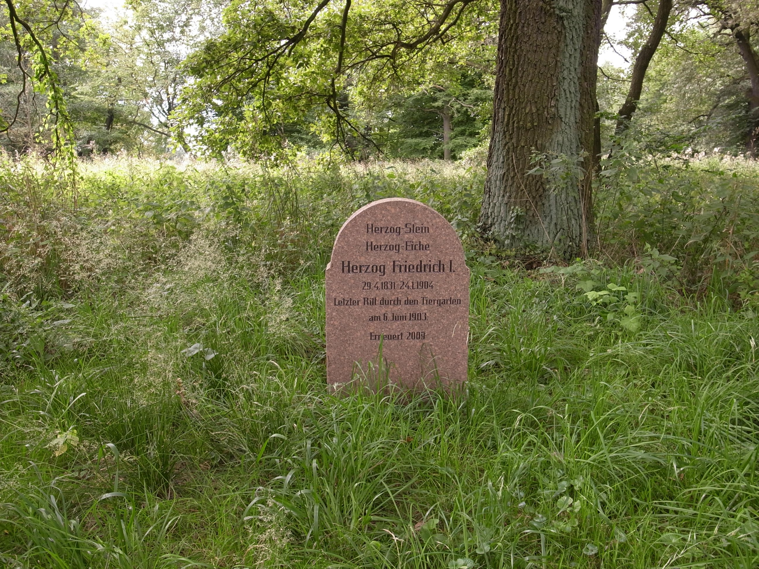 Friedrich I. (Anhalt), Herzog-Stein und Herzog-Eiche in Dessau